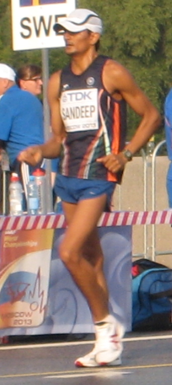 Чемпионат мира по лёгкой атлетике 2013. Ходьба 50 км, мужчины: Сандеп Кумар